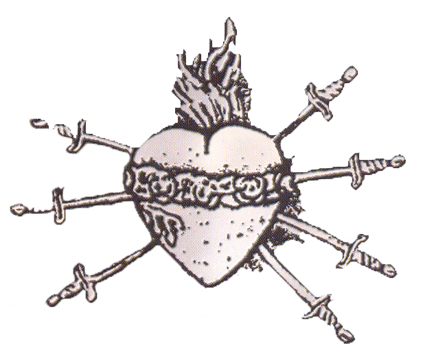 Emblema de la Hermandad de Ntra. Señora de los Dolores de Ocaña (Toledo)